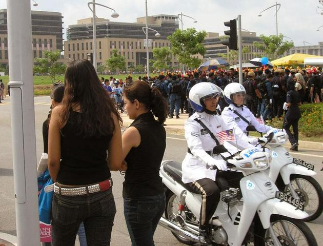 Les officiers femelles de Branche malaisienne Royale de La circulation de La police pendant la Parade nationale malaisienne en 2005.